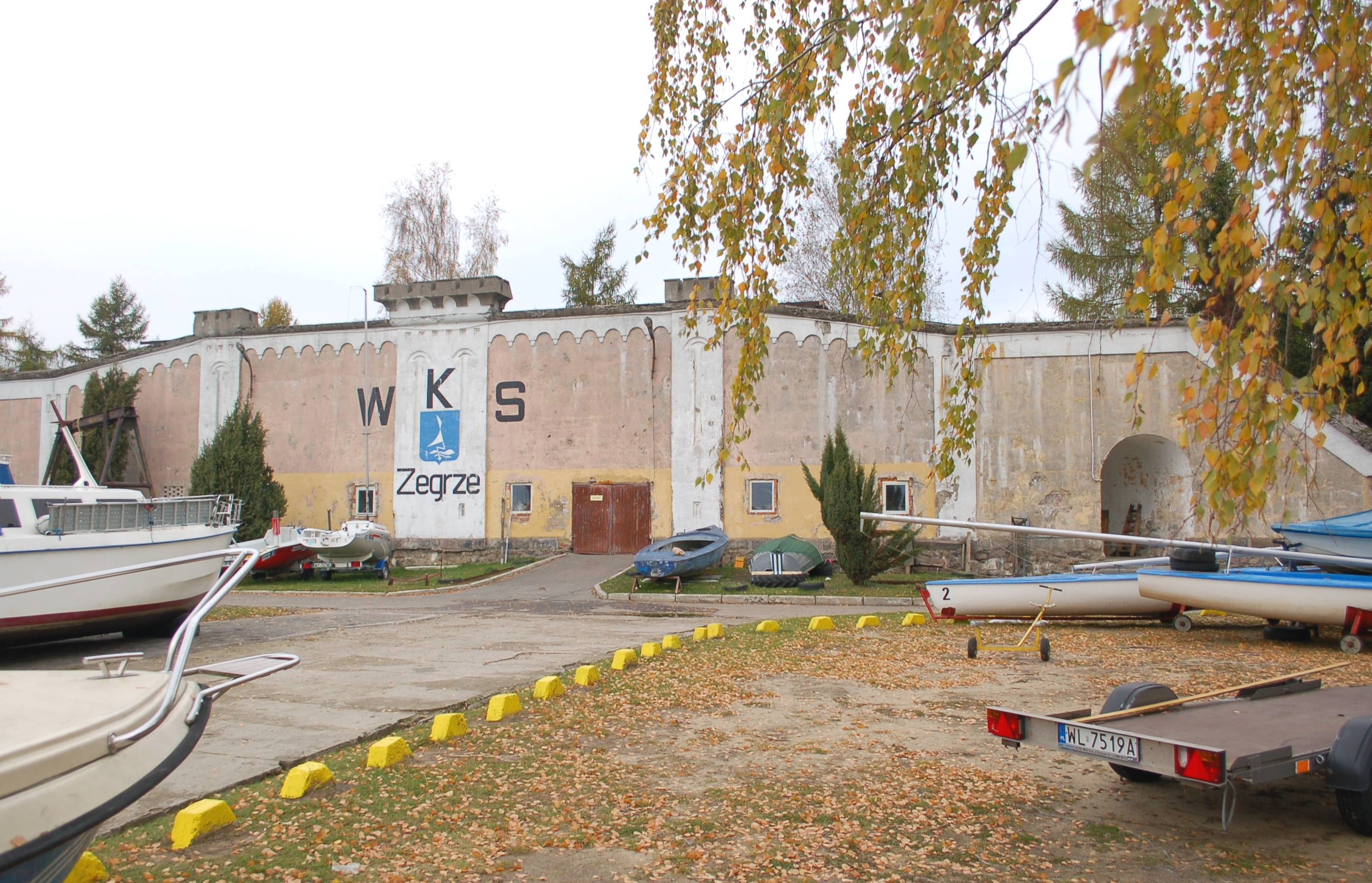 Zegrze small fortification